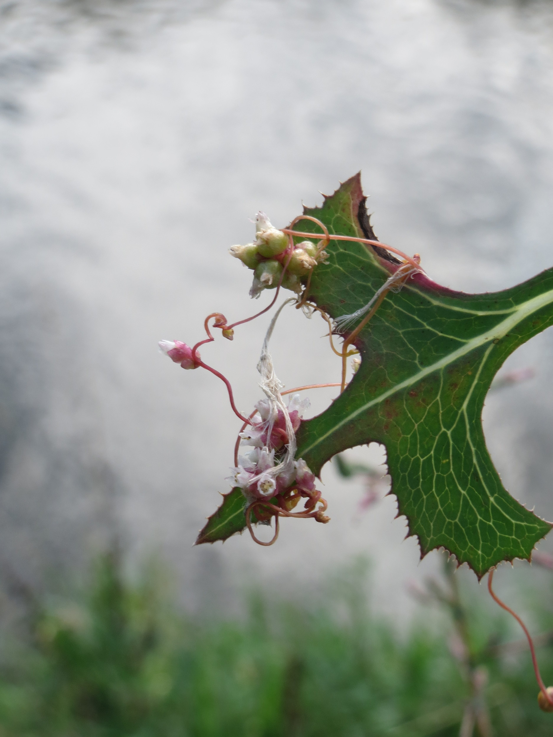 Die seltene Nessel-Seide (Cuscuta europaea) an einem Stachel-Lattich am Kraichbach bei Hockenheim